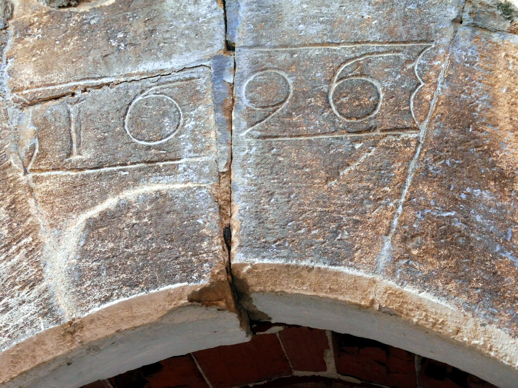 Habitatge al carrer Sant Antoni, 26 (Castelló de Farfanya): clau del portal